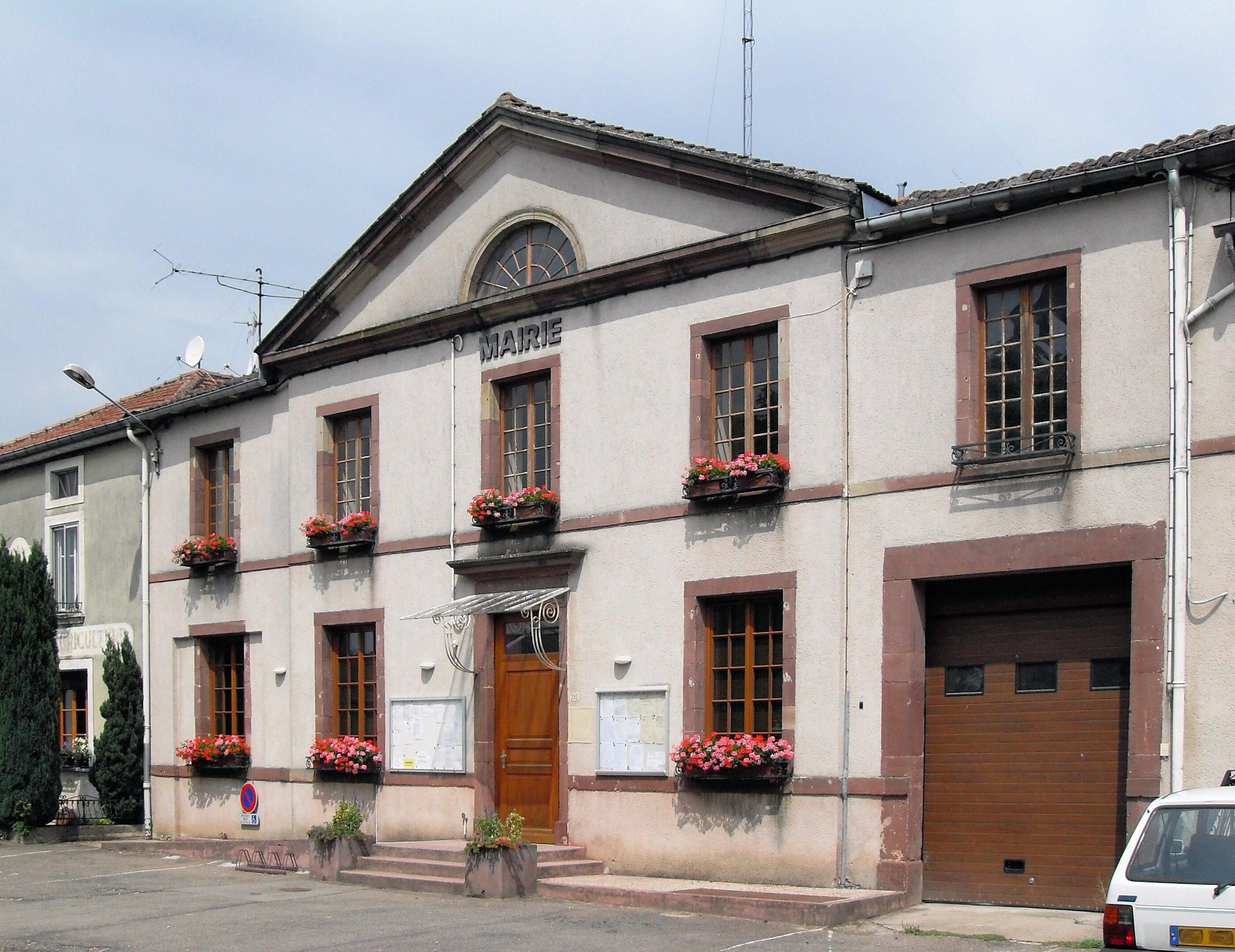 La mairie d'Oëlleville